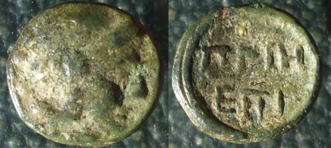 petit bronze de Priène, Ionie, -280 -270 0.59g, 8.52mm, 6h A: tête d'Athéna casquée à droite R: ΠΡΙΗ / ΕΠΙ